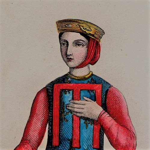 Mahaut o Matilde contessa d'Artois - 1302-29